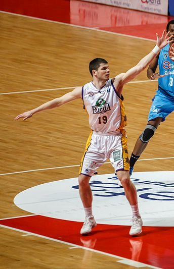 Vytenis Cizauskas